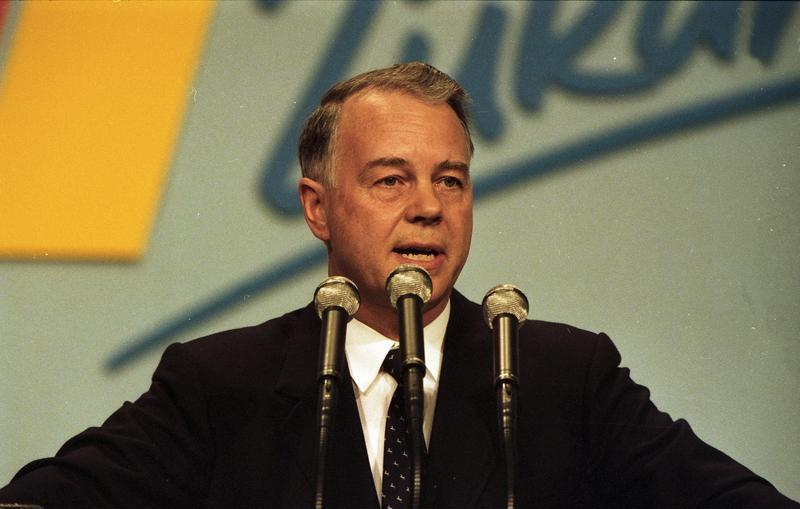 13.06. - 15.06.1988 36. CDU-Bundesparteitag in der Rhein-Main-Halle in Wiesbaden